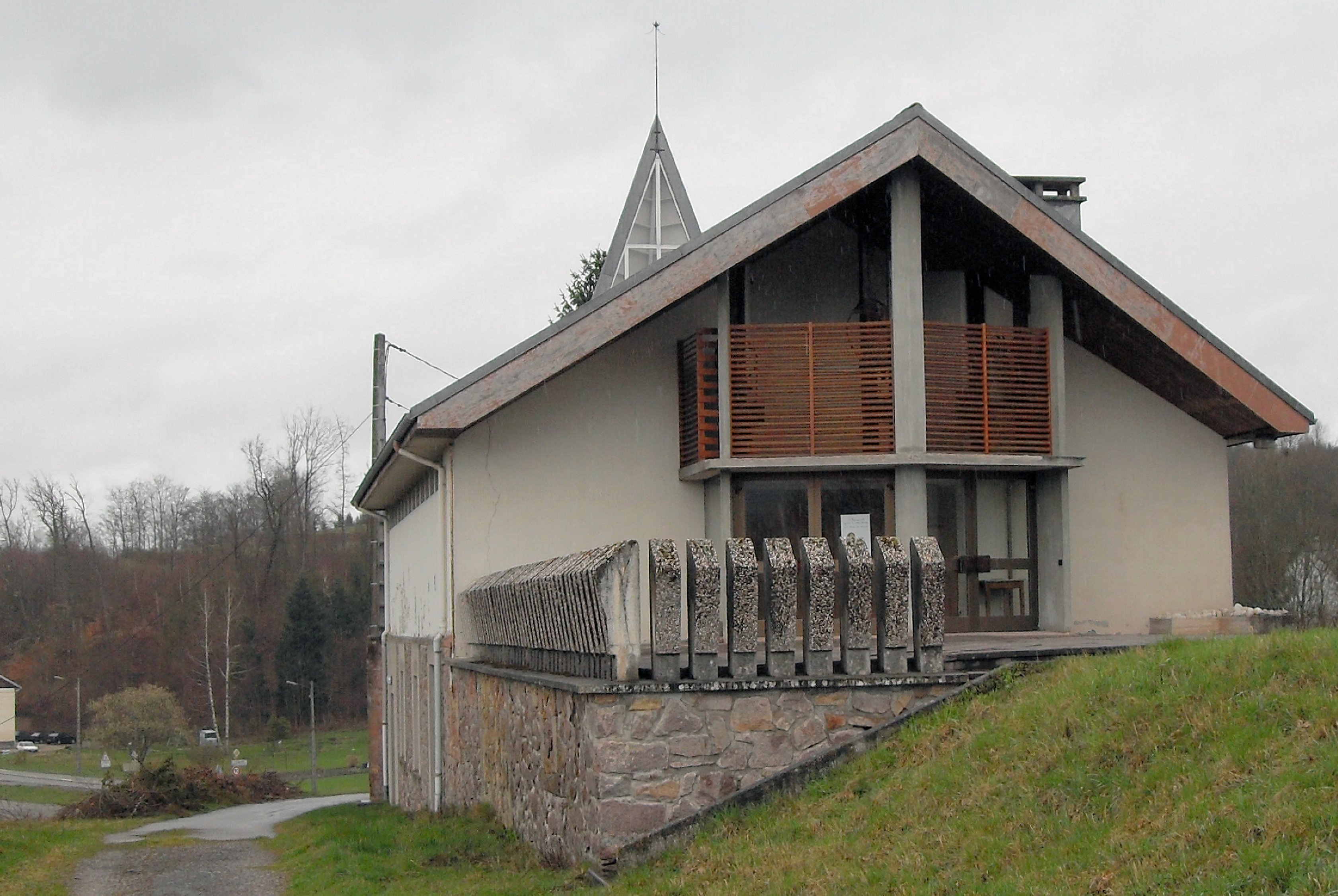 L'église du Sacré-Cœur à Laveline-devant-Bruyères